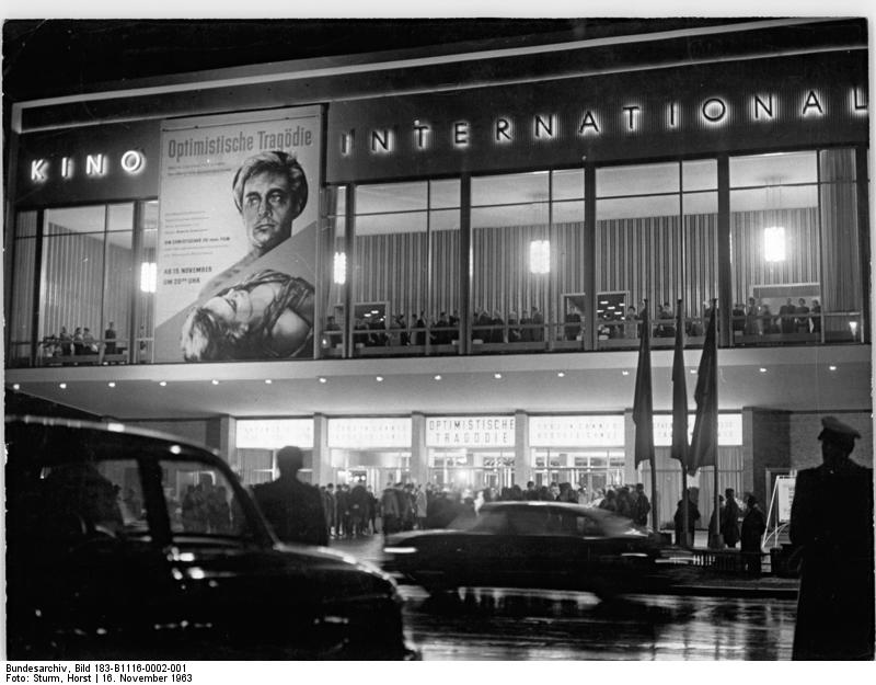 Berlin, Kino "International", Nacht Zentralbild Sturm Ge. "Kino International" eröffnet Mit dem 1963 in Cannes mit einem Sonderpreis ausgezeichneten Film "Optimistische Tragödie" wurde am Abend des 15.11.1963 das moderne "Kino International" in der Karl-Marx-Allee Berlin eröffnet.